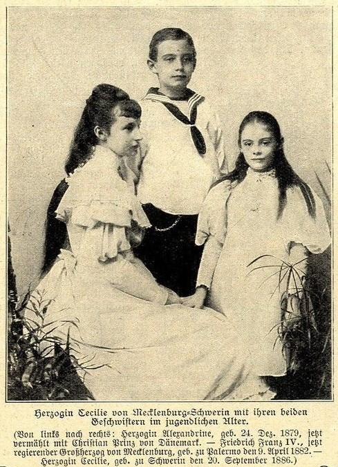 L to R: Alexandrine von Mecklenburg-Schwerin (1879−1952), Friedrich Franz IV und Cecilie von Mecklenburg-Schwerin, c. 1894.